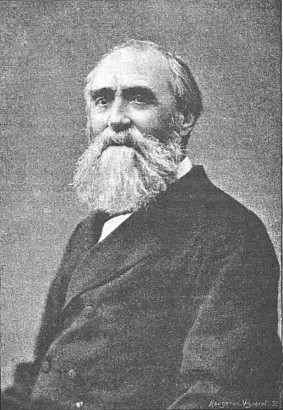 Alfred Madier de Montjau par Georges Camus